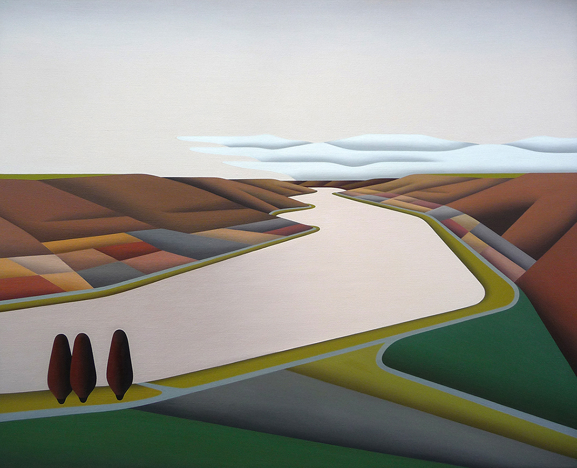 Jan Schueler, Sommerabend am Rhein, 2019, Öl auf Leinen, 90 x 110 cm